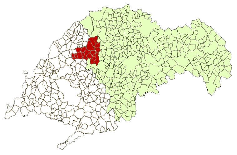 Mapa de la Comunidad de Villa y Tierra de Uceda, a caballo entre las provincias de Guadalajara y Madrid.